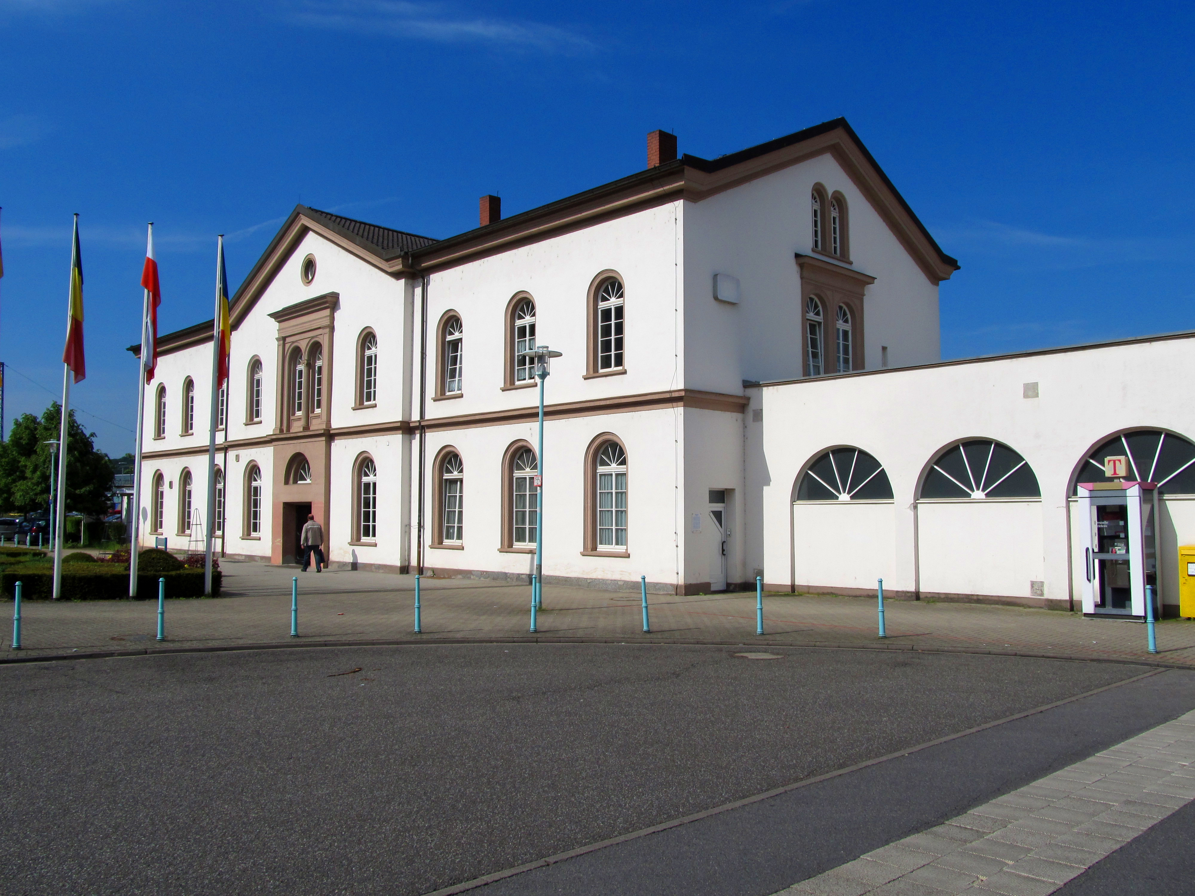 Bahnhof Merzig (Saar), Landkreis Merzig-Wadern, Saarland